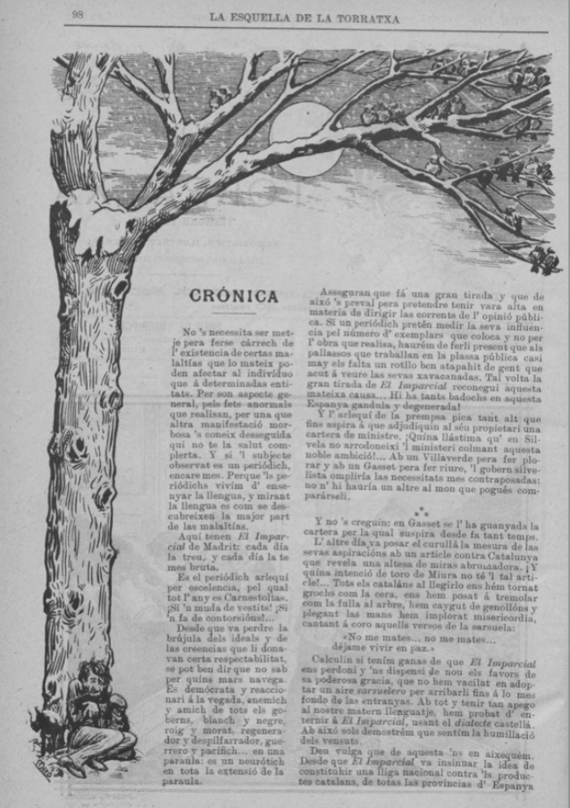 Página de la revista La Esquella de la Torratxa